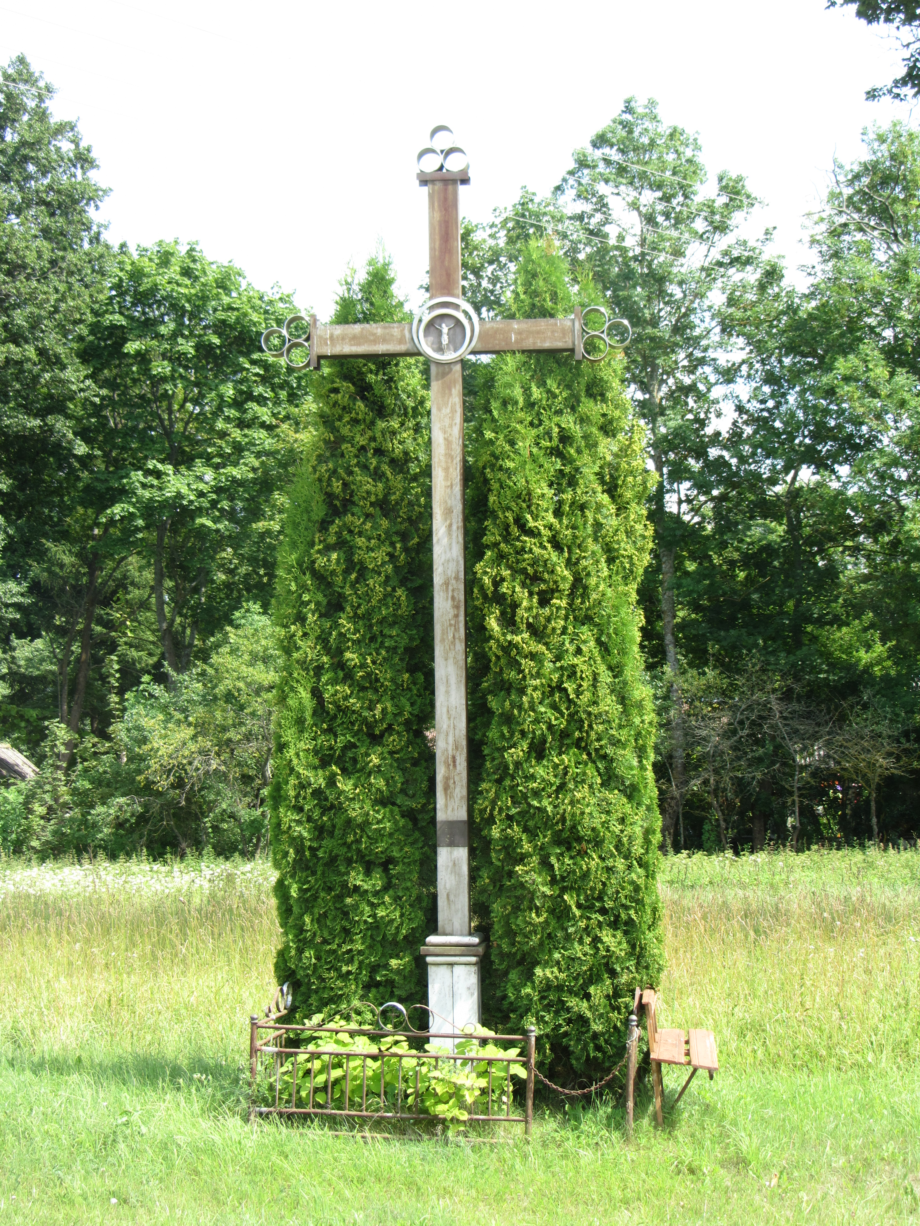 Rimšės sen., Lithuania